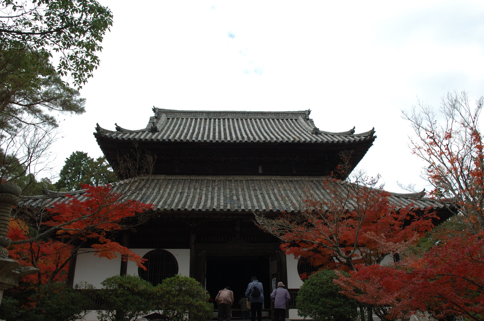 Buddha hall of Hofukuji